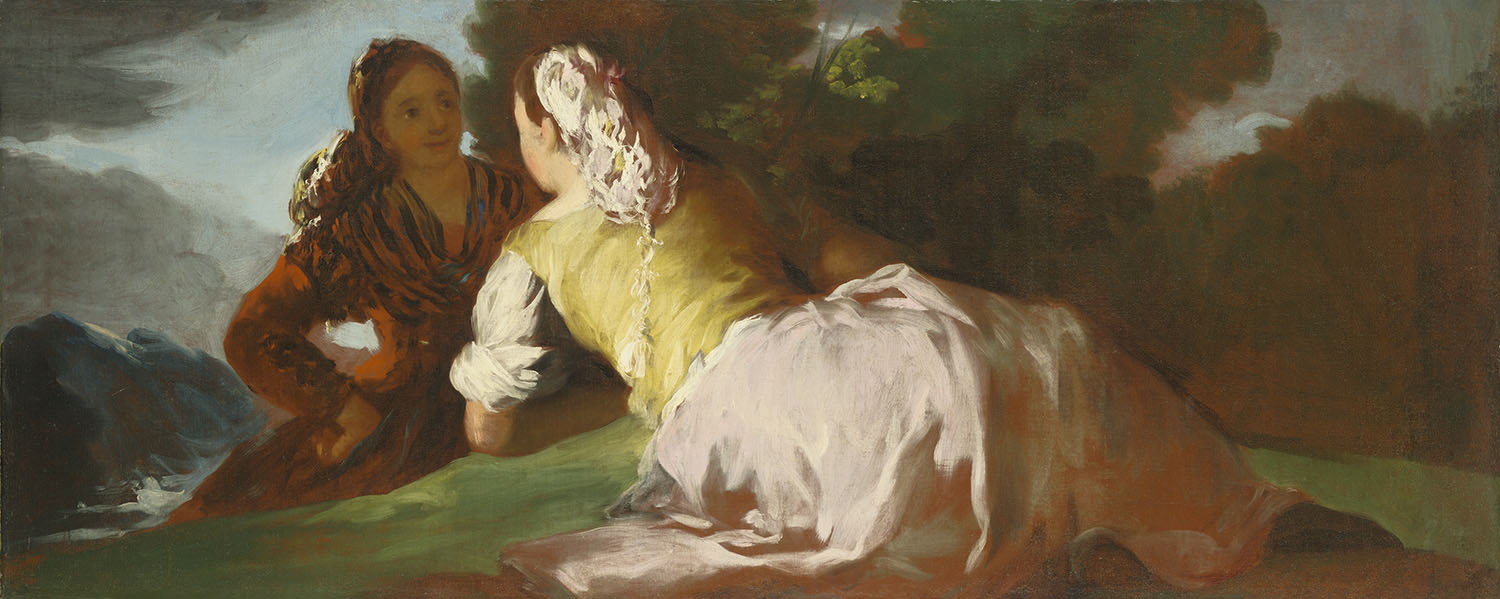 Cartones para tapices.